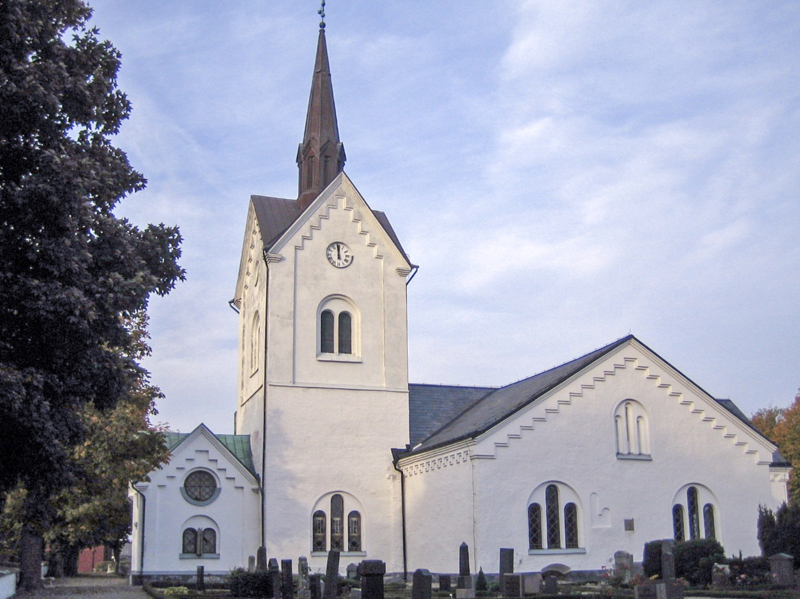 The church of Östra Vemmenhög, Skåne, Sweden.